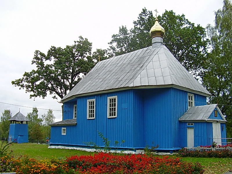 Здзітава. Свята-Мікіцкая царква